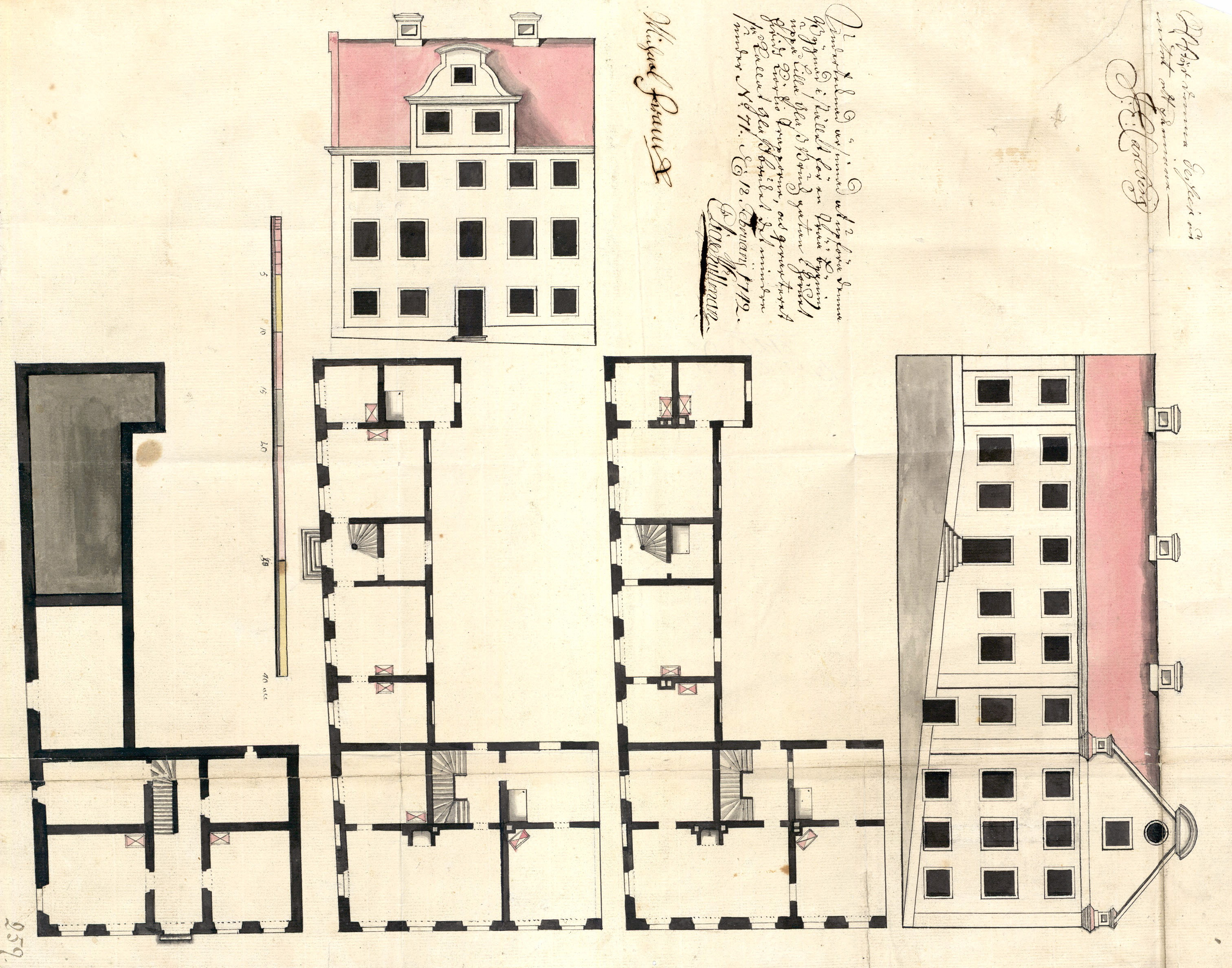 Nybyggnad i Glasbruket Mindre, kallad Elias Kuhlmans hus